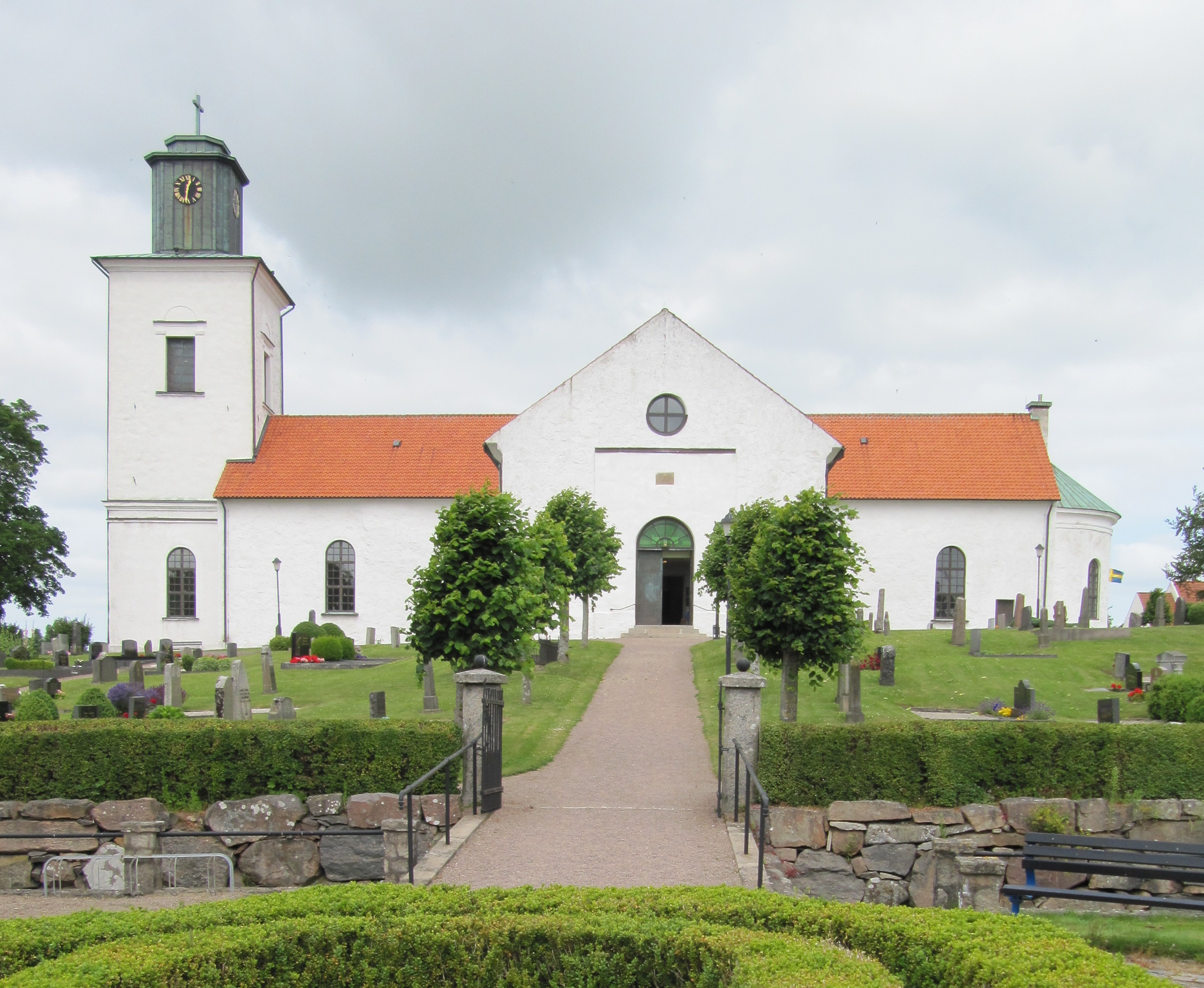 Västra Karups kyrka från söder